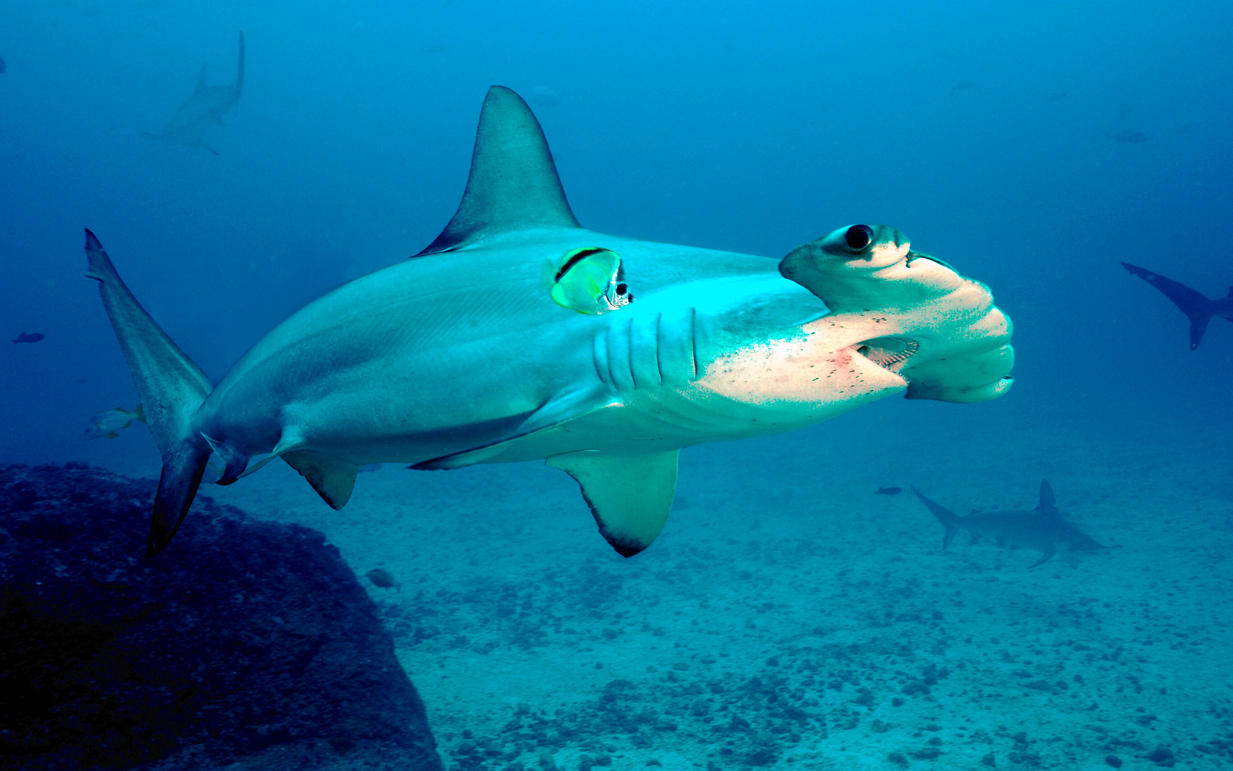 Акула-молот